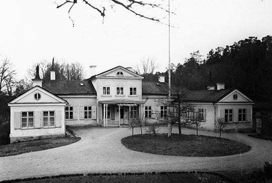 Villa Beylon, Ulriksdal